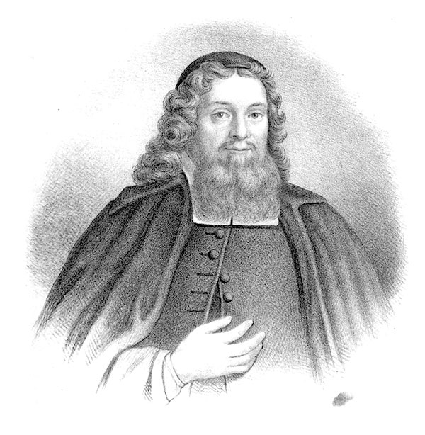 Andreas Olavi Rhyzelius (1677-1761)